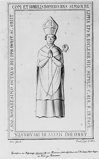 Simon III. zur Lippe, Fürstbischof von Paderborn. Federzeichnung von Emil Zeiß aus dem Jahr 1864 des Grabsteins im Dom zu Paderborn.